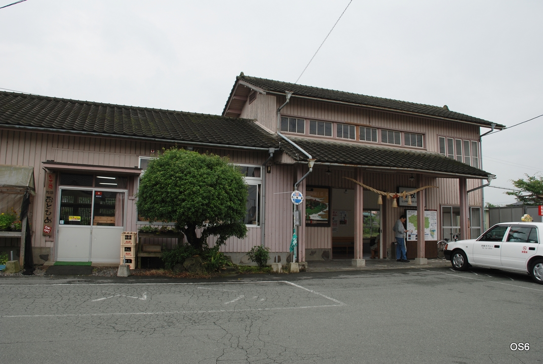 内牧駅 Uchinomaki station